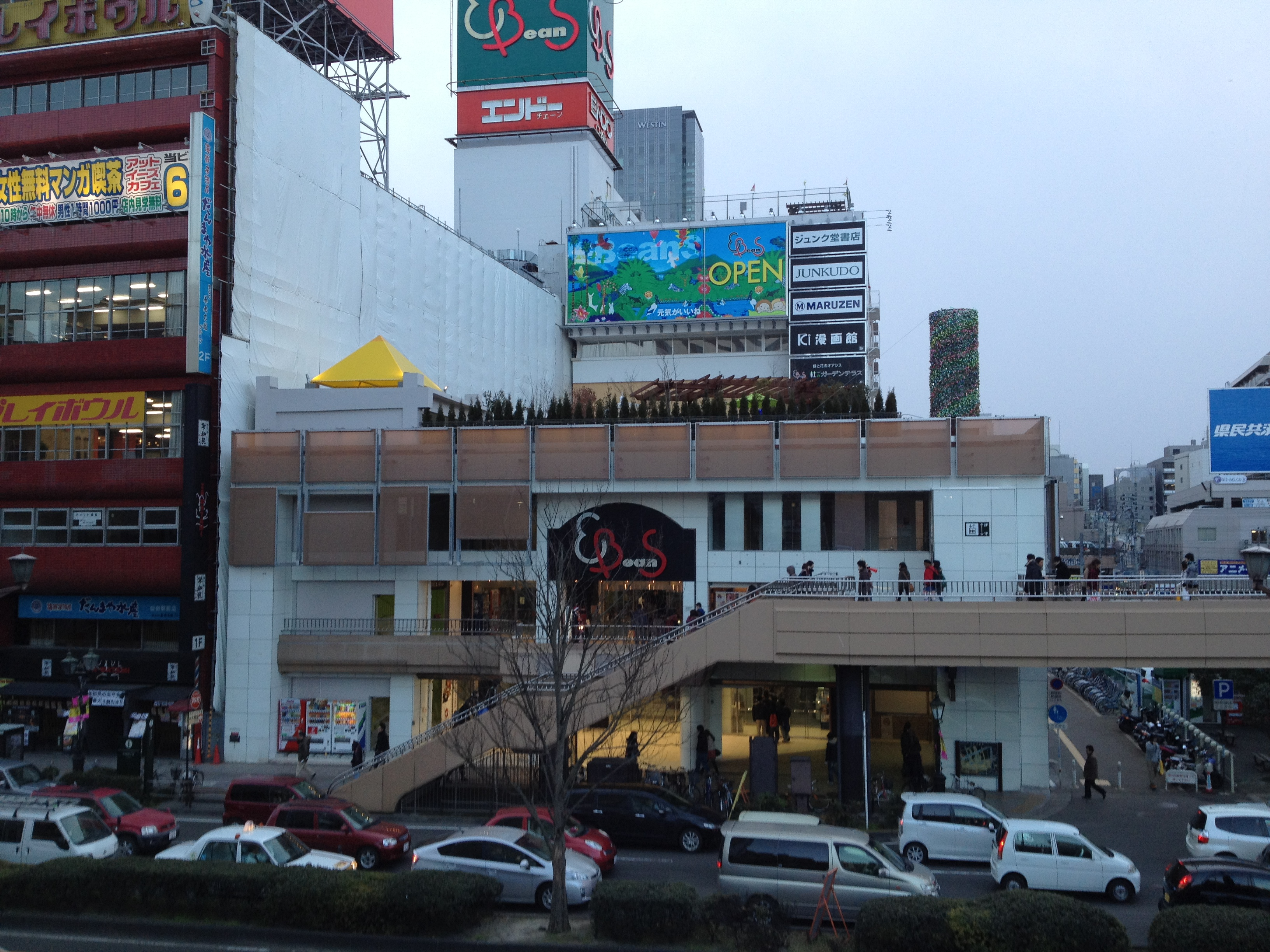 仙台市青葉区に有るEBeanS(2011年11月リニュアールオープン時)